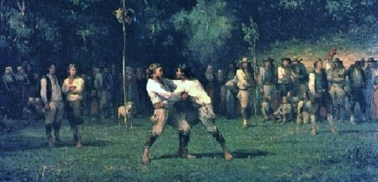 MUCEM (Musée des Civilisations de l'Europe et de la Méditerranée) de Marseille, mais est en dépôt au Musée des beaux-arts de Quimper. Le peintre s'est probablement inspiré des lutteurs combattant lors du pardon de Saint-Cadou en Gouesnach.